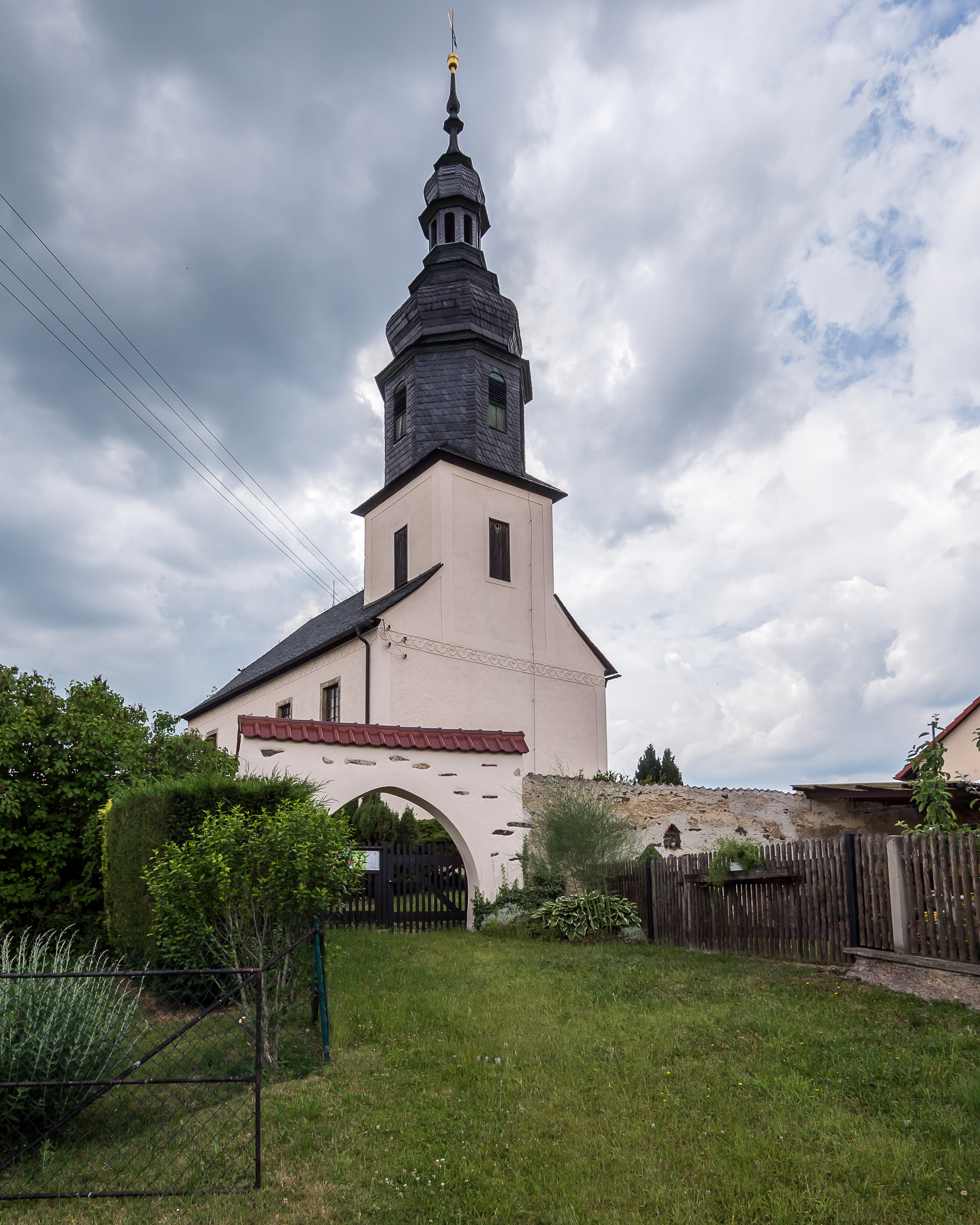 Gertewitz Dorfkirche